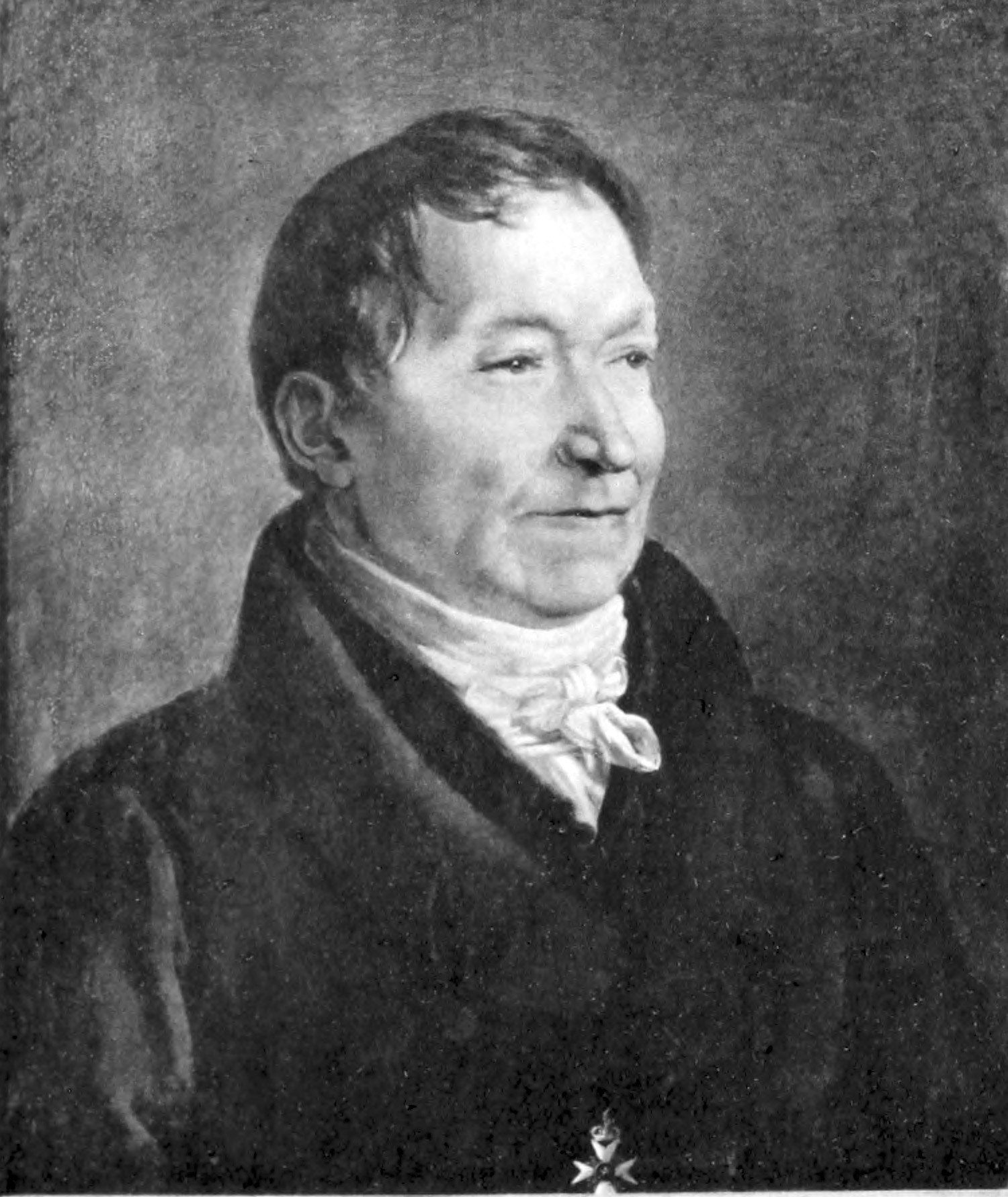 Carl Birger Rutström (17-18)